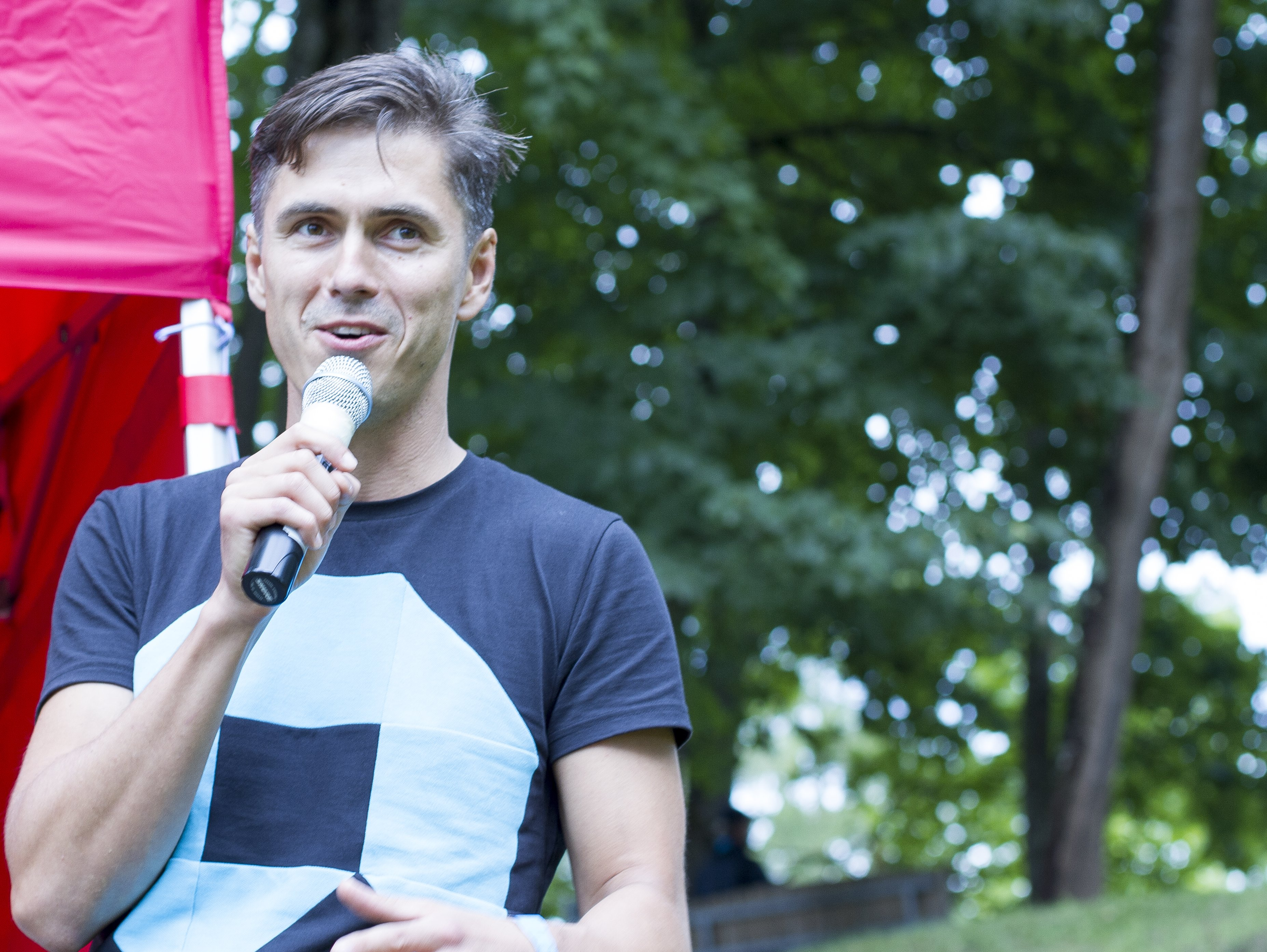 Arvamusfestival 2014